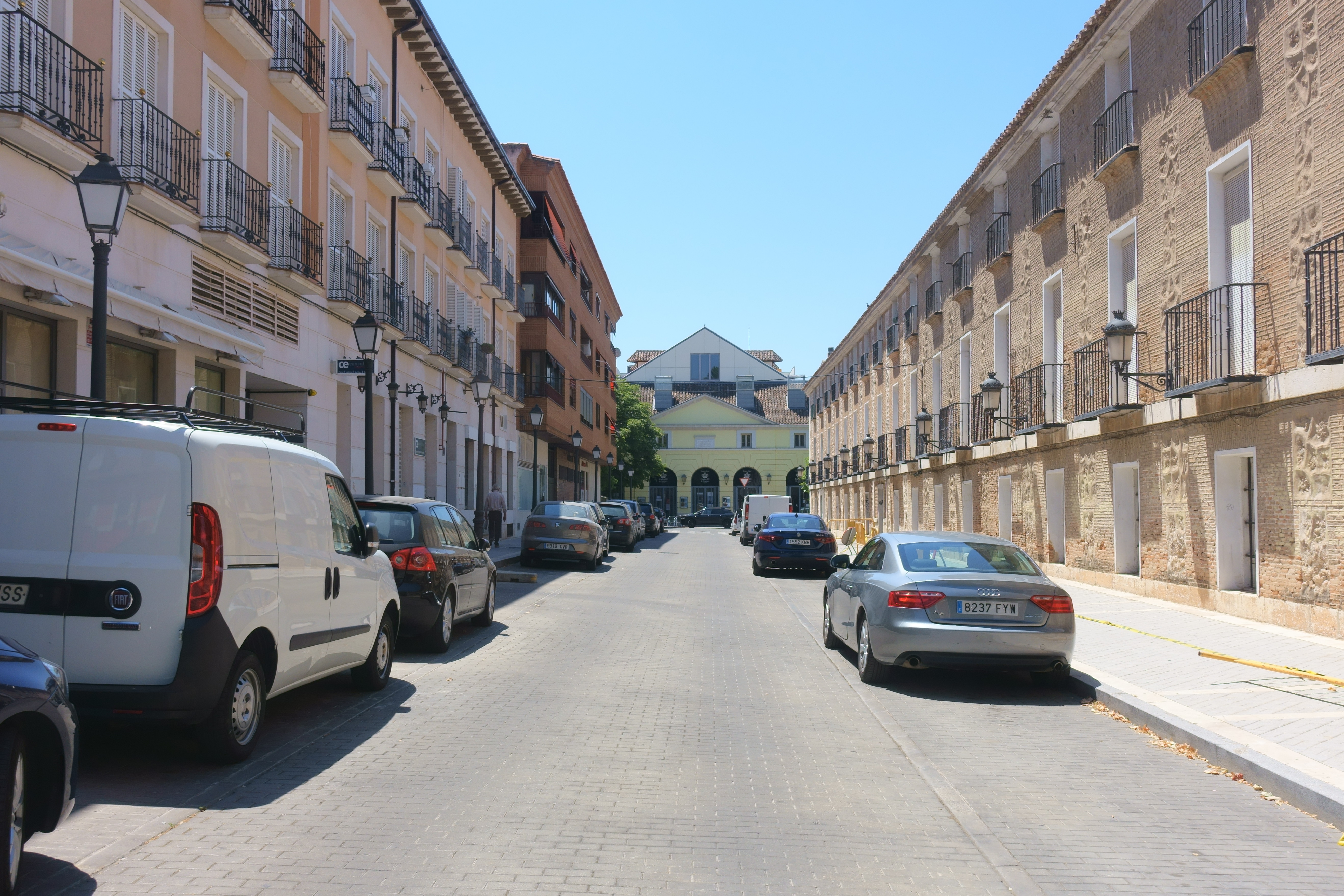 Vista del Teatro Real Carlos III desde la calle Gobernación, Aranjuez (Madrid, España).